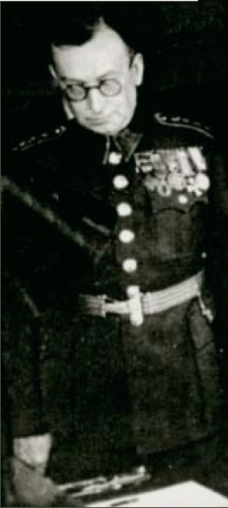 Plukovník zeměpisné služby PhDr. Jiří Čermák (* 1884 – 1955) byl zeměpisec, kartograf a cestovatel. Autor horolezecké, legionářské a zeměpisné literatury. Od roku 1932 vykonával funkci zástupce náčelníka Vojenského zeměpisného ústavu (VZÚ) v Praze. Od března 1937 do února 1940 byl velitelem Vojenského zeměpisného ústavu, resp. Zeměpisného ústavu ministerstva vnitra (ZÚMV). V souvislosti se zatajováním geodetického a kartografického materiálu před Němci byl počátkem února 1940 suspendován z velení ústavu, zatčen gestapem, uvězněn a postaven před německý vojenský válečný soud. Za napomáhání byl odsouzen a následně (až do konce druhé světové války) vězněn. Snímek pochází z roku 1938 a je výřezem z fotografie, na které se prezident republiky Dr. Edvard Beneš v doprovodu velitele VZÚ (J. Čermáka) seznamuje s novými mapovými podklady zpracovanými ve VZÚ. Autorem této fotografie je neznámá osoba.